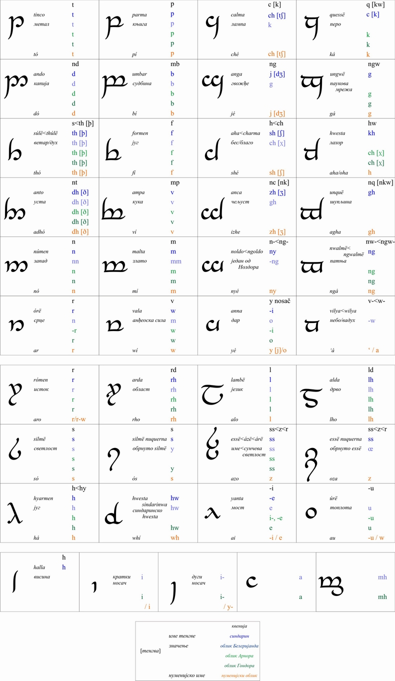 Упоредна табела тенгвар система